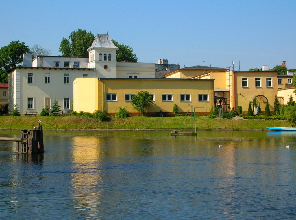 Dawna garbarnia Ludwiga Buchholza, budynek właściciela z 1862 r., ob. budynek należący do Wyższej Szkoły Gospodarki w Bydgoszczy